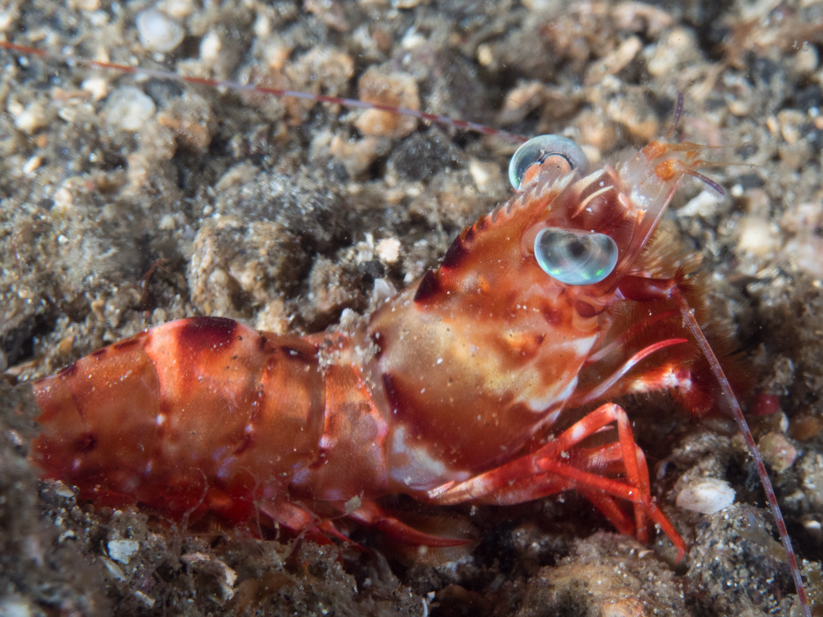 Humpback prawn (Metapenaeopsis lamellata) - Lembeh, Indonesia